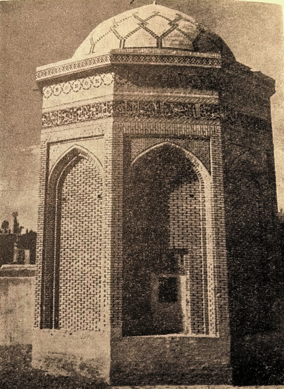 امامزاده جعفر که با نام بقعه جعفریه هم خوانده می‌شود در شهرستان اصفهان جای گرفته و با شمارهٔ ثبت ۱۹۸ به‌عنوان یکی از آثار ملی ایران به ثبت رسیده است